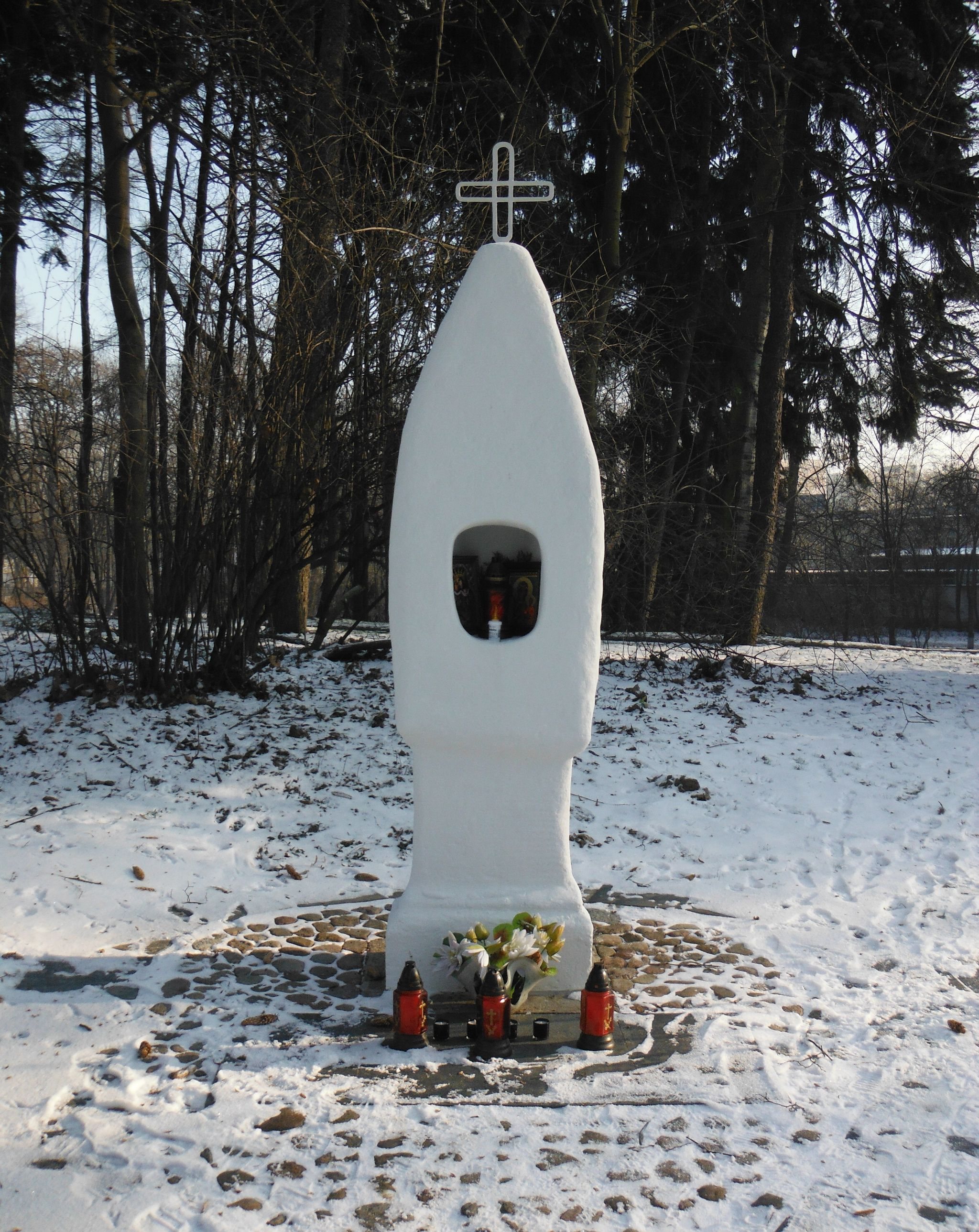 Kapliczka w Parku Skaryszewskim im. Ignacego Jana Paderewskiego w Warszawie - zaprojektowana przez Janusza Alchimowicza w 1937 roku.